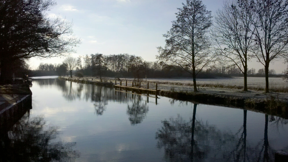 Flusslandschaft der Hamme in der Nähe von Worpswede in Niedersachsen.